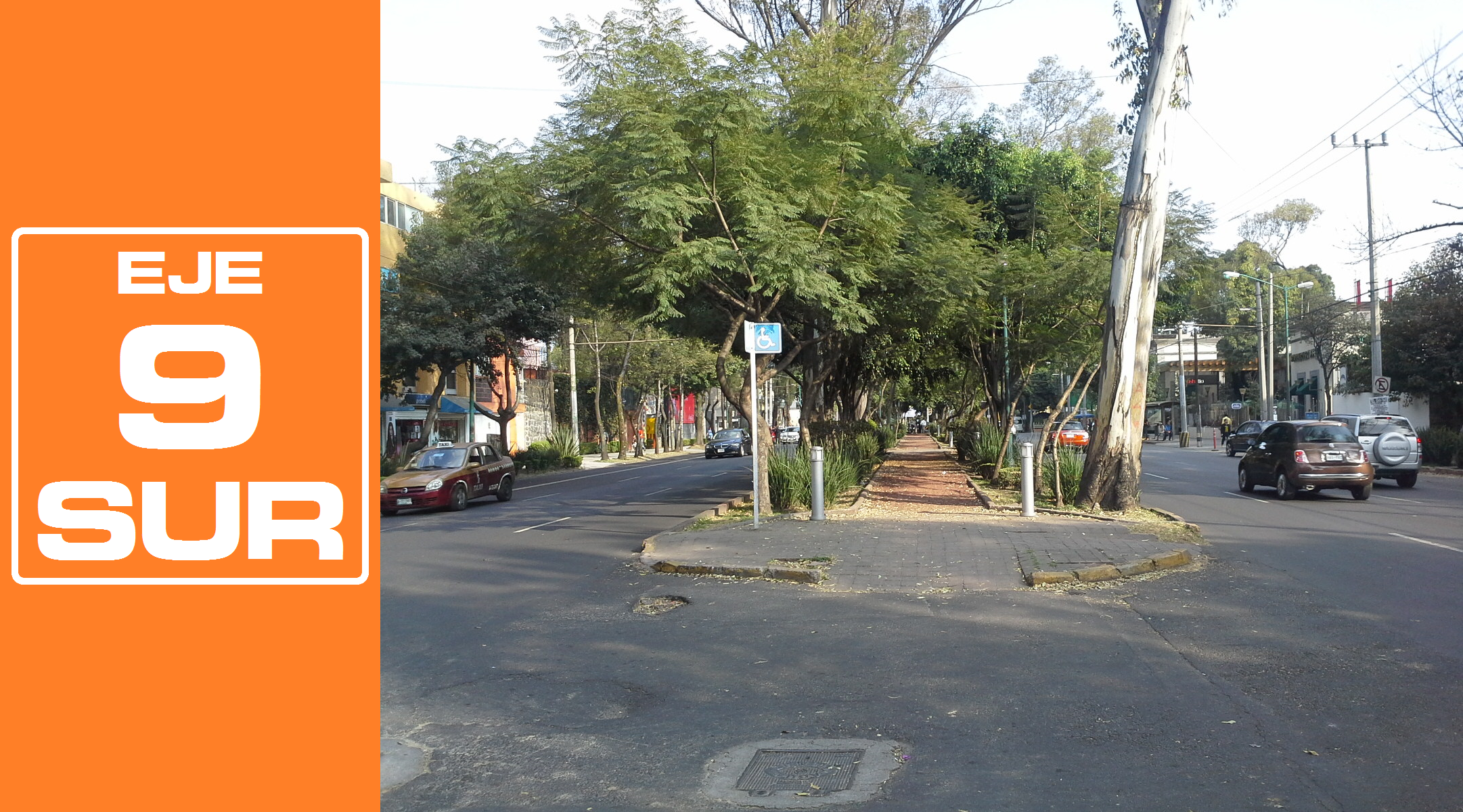 Rediseñado original de la señalética de los Ejes viales de la Ciudad de México por José García (Wiki ID: narumiyama)